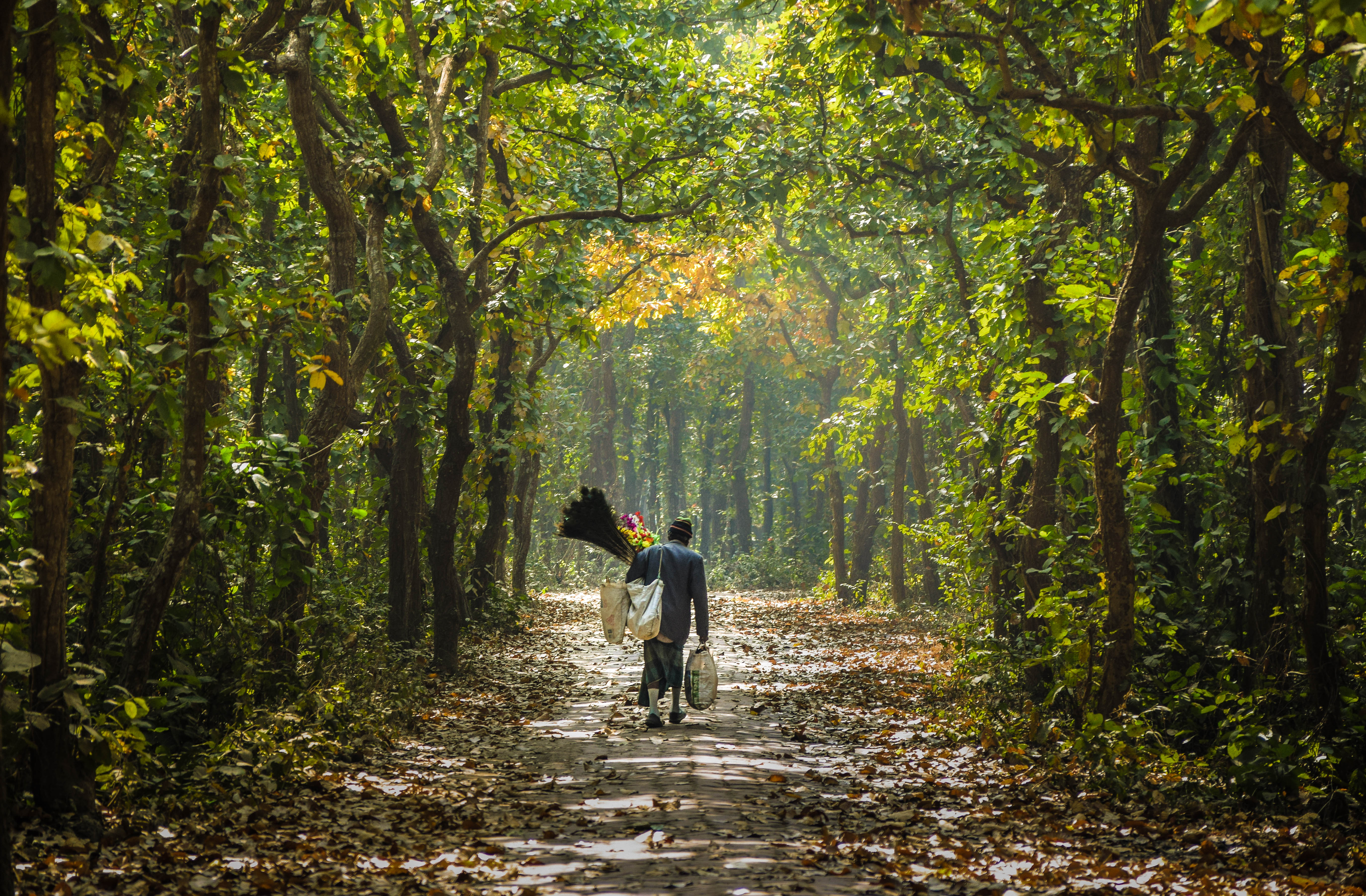 মধুপুর জাতীয় উদ্যান